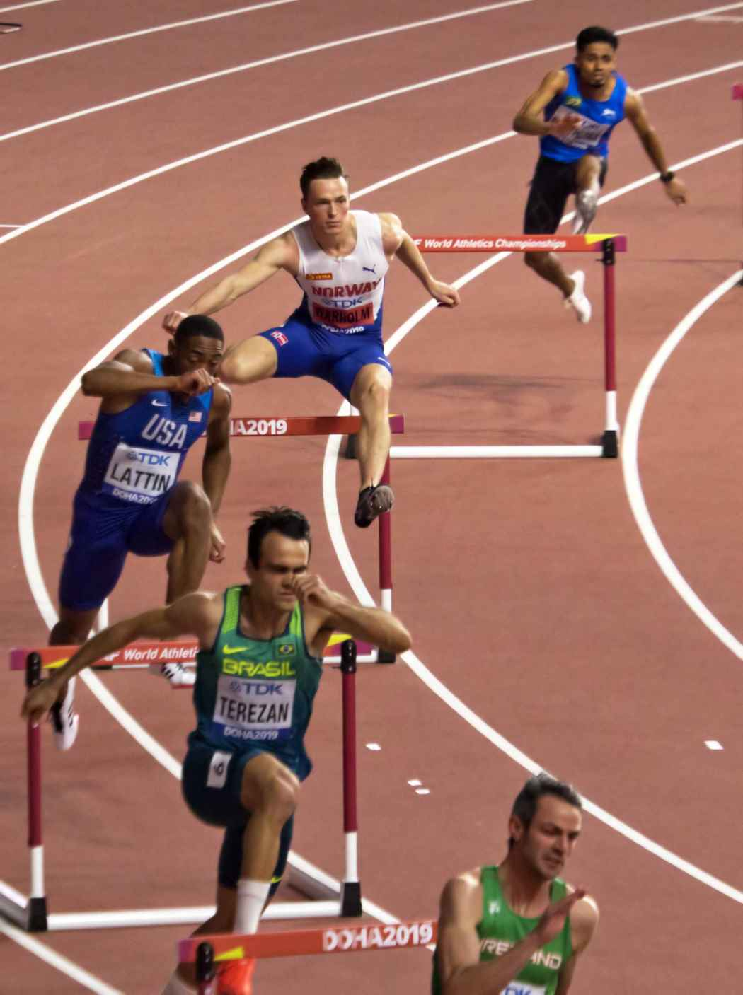 DOH10092 warholm reeksen 400H